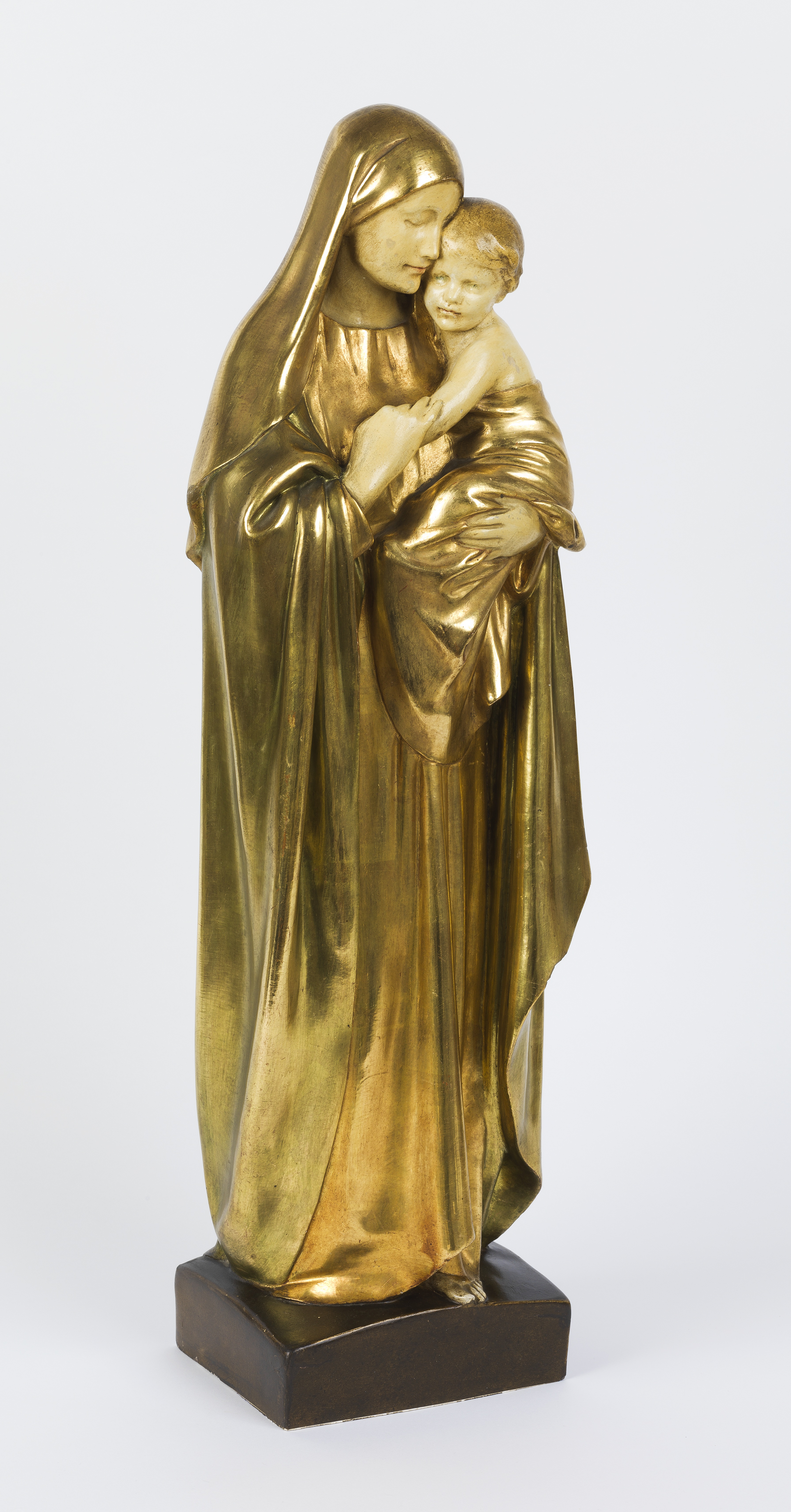 Figura de Virgen con niño